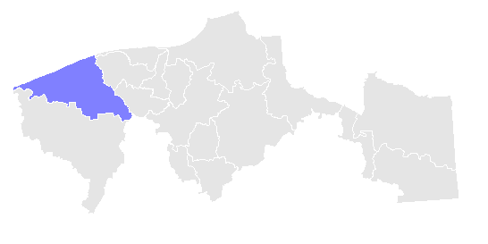 Cárdenas, Tabasco. Hecho con Microsoft Paint